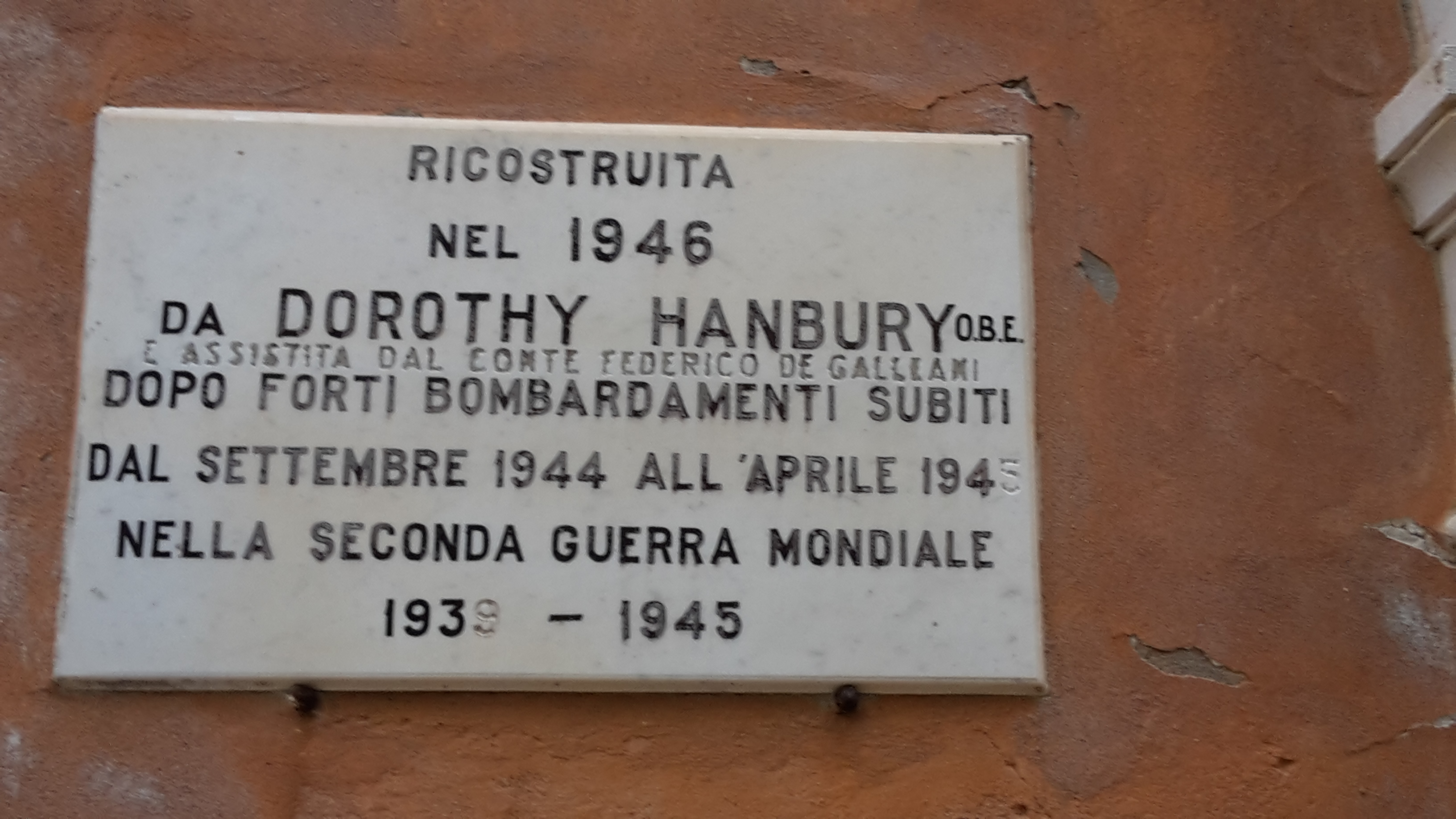 Placca commemorativa per la ricostruzione di Villa Hanbury del 1946 effettuata da Lady Dorothy.